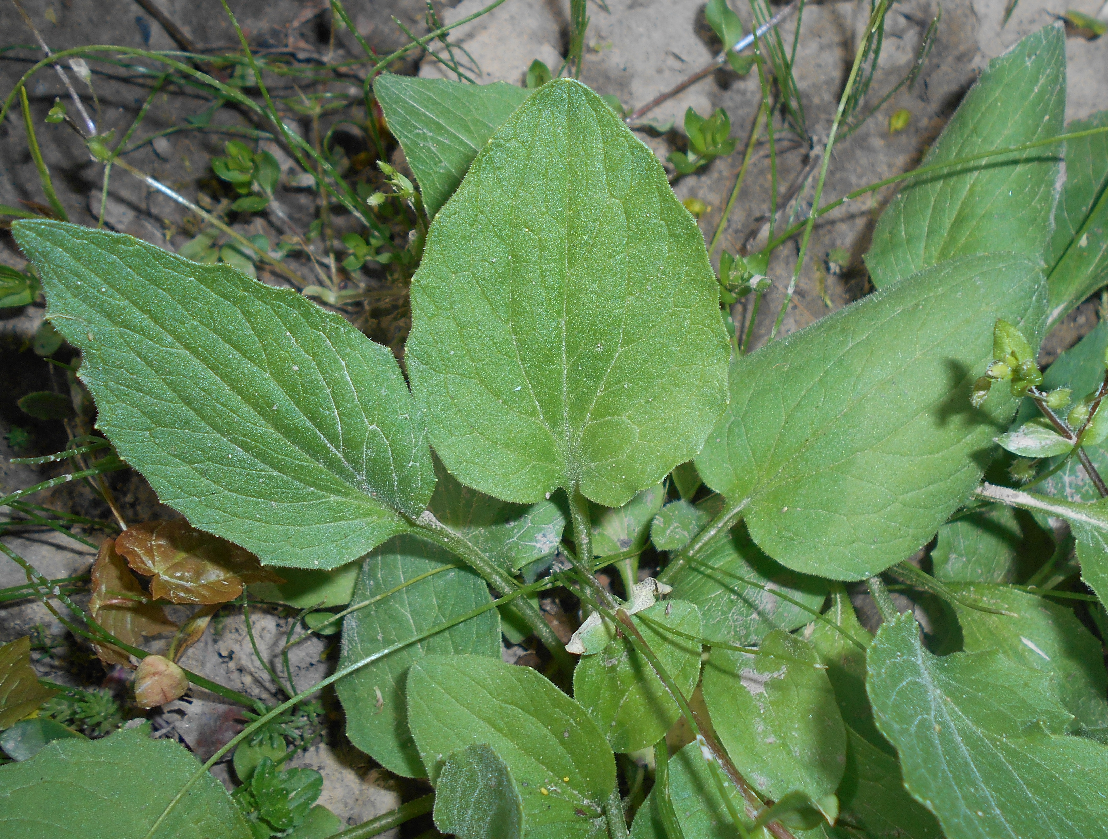 Omieg babkolistny (Doronicum plantagineum), Ogród Botaniczny UMCS w Lublinie